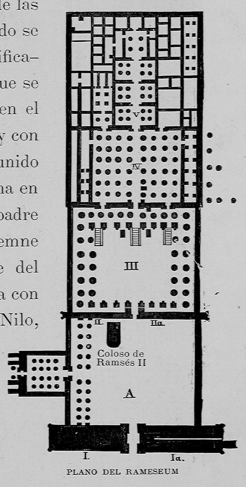 Autor: Ebers, Georg Moritz, 1837-1898 Descripción bibliográfica: Egipto / por Jorge Ebers ; traducción directa del alemán por Antonio Bergnes de las Casas, revisada y corregida por Cayetano Vidal de Valenciano. - Ed. monumental ilustrada con 650 grabados ... del reputado pintor Cárlos Werner. - Barcelona : Espasa y Compañía, 1882?. - 2 v. (X, 408, [1] p., [14] h. de lám. ; 438, [1] p., [14] h. de lám.). : il. ; 40 cm Materia: Egipto - Historia Materia: Egipto - Descripciones y viajes - Siglo 19 Notas: Palau, t. 5, p. 1, lo fecha de manera aproximada en 1882. - Port. a dos tintas. - Antep. - Ilustrada con 650 grabados intercalados en el texto y enriquecida con dos cartas geográficas tirada a tres tintas, una portada en colores y 24 magnificas imitaciones de las artísticas acuarelas del pintor Carlos Weiner Traductor:Bergnes de las Casas, Antonio, 1801-1879 Ilustrador:Werner, Karl, 1821-1888, il. Localización: Libro completo